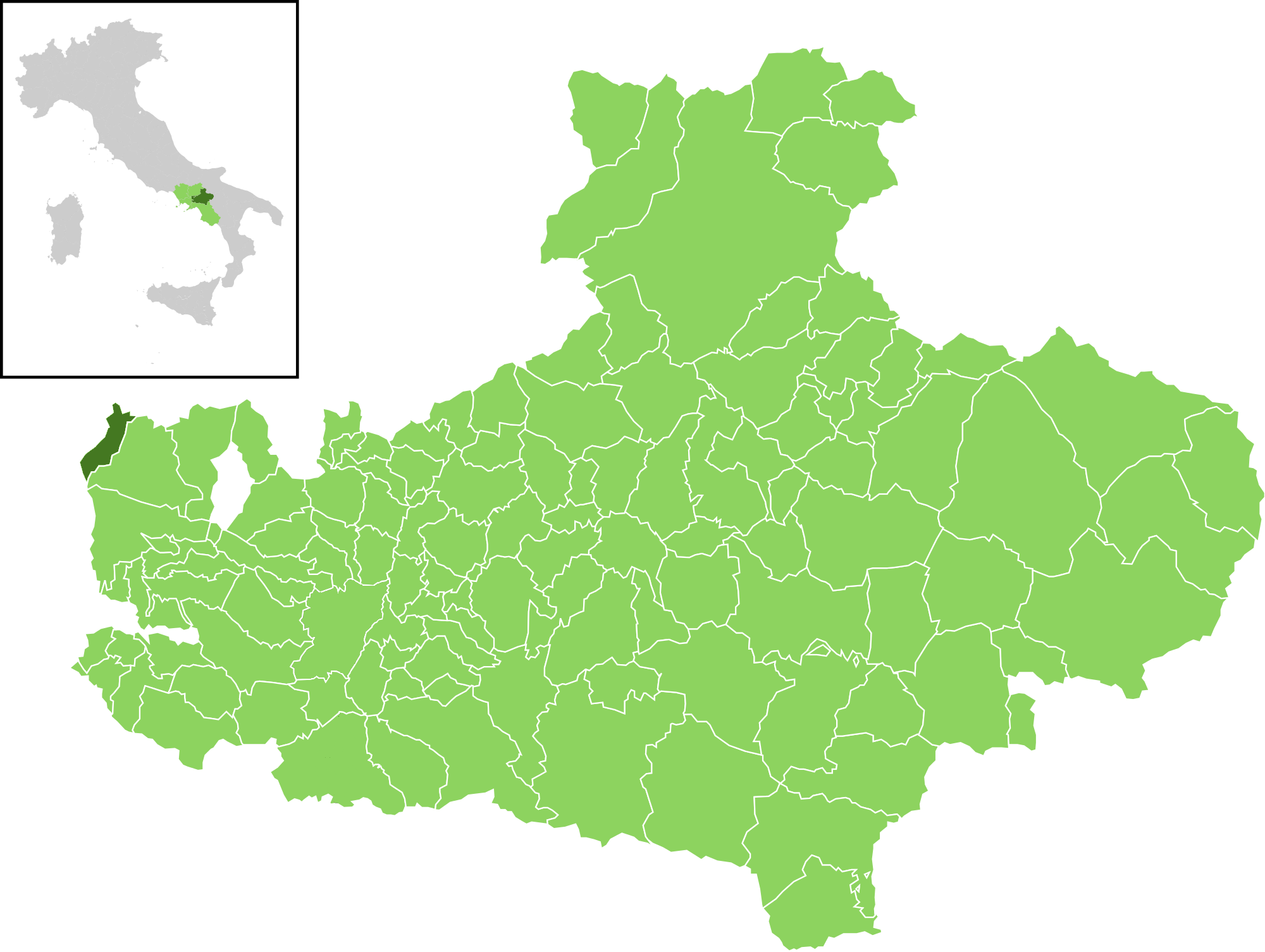 Posizione del comune all'interno della provincia di Avellino